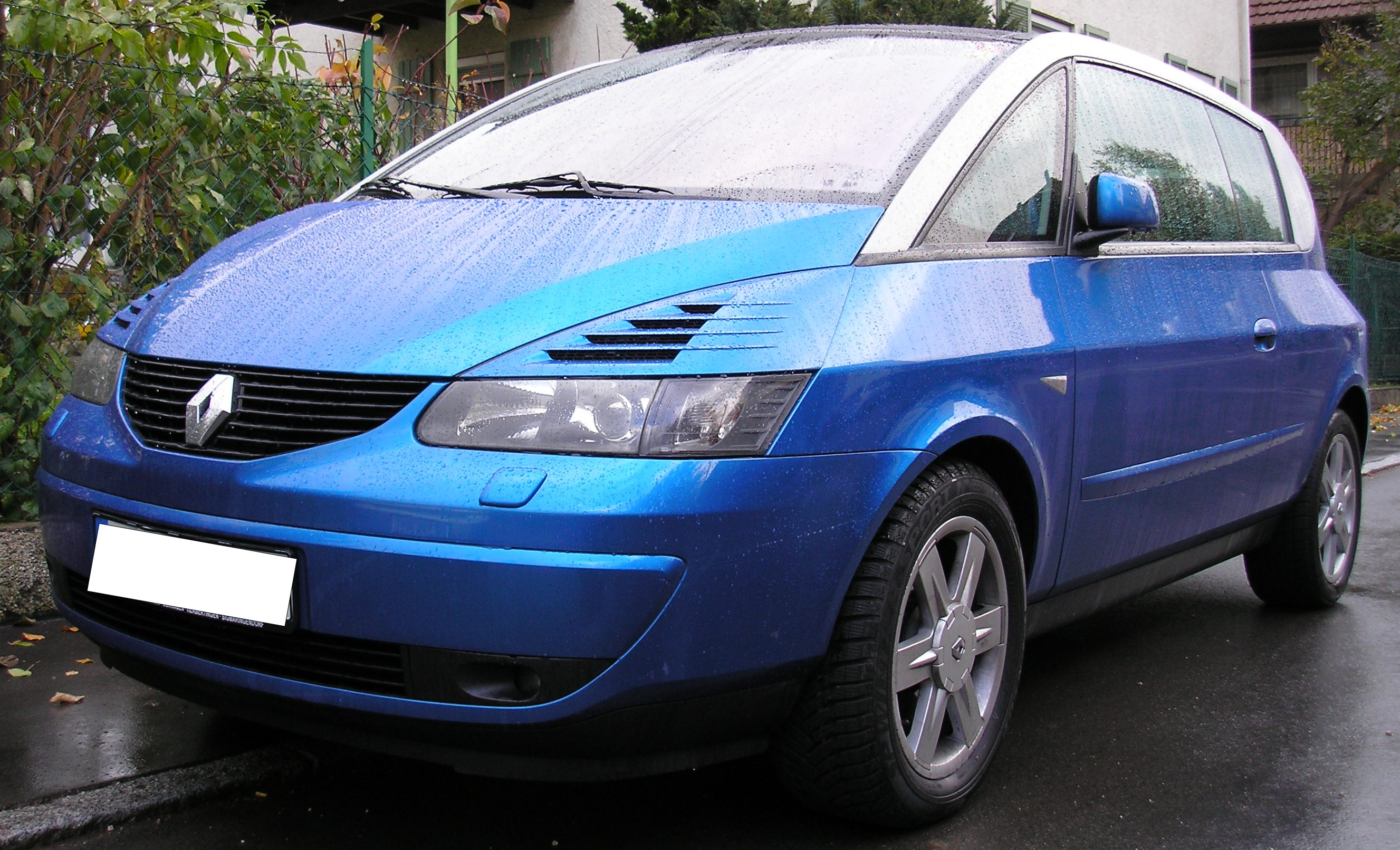 Renault Avantime